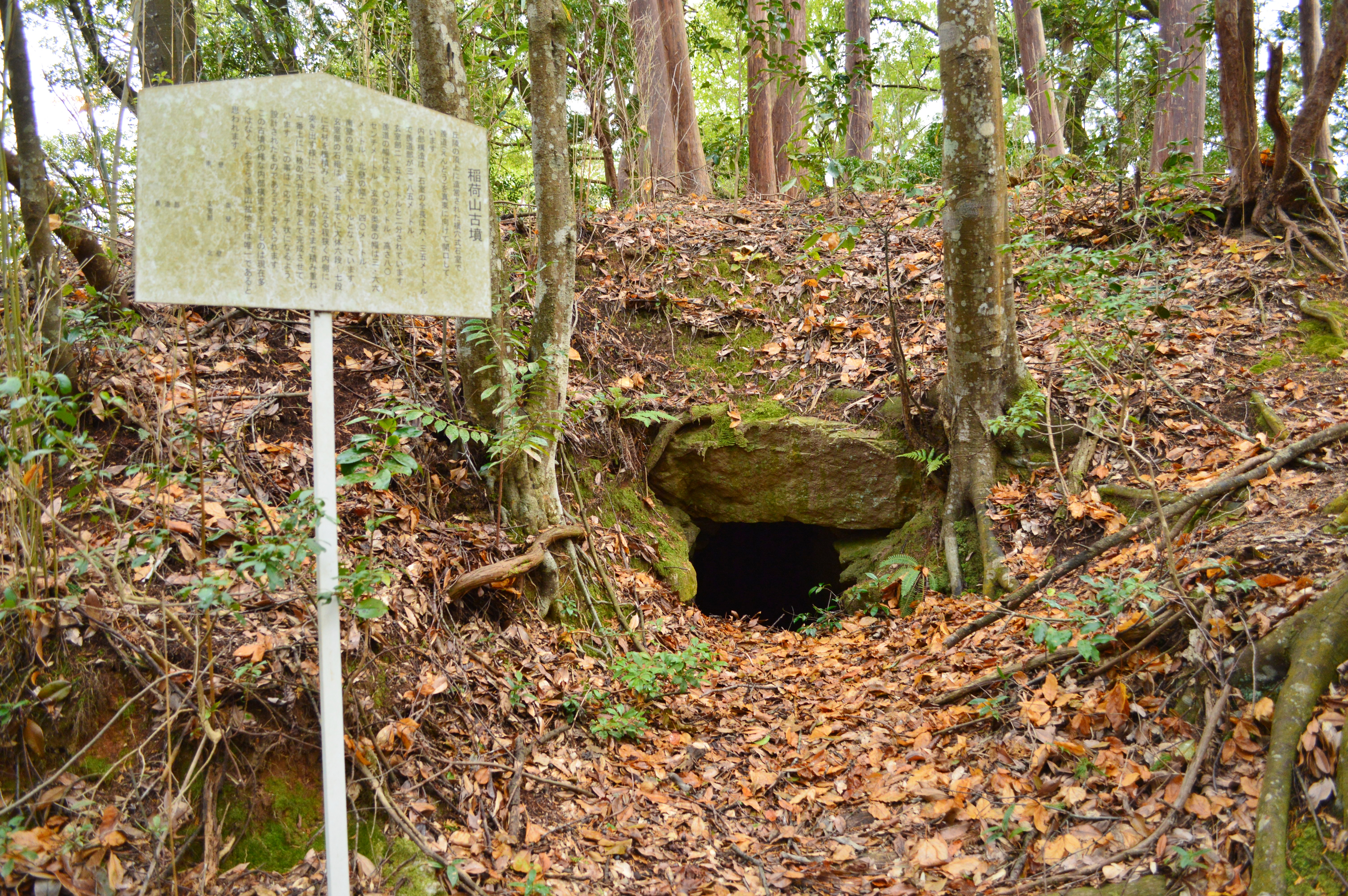 稲荷山古墳 (丹波篠山市) 石室入り口